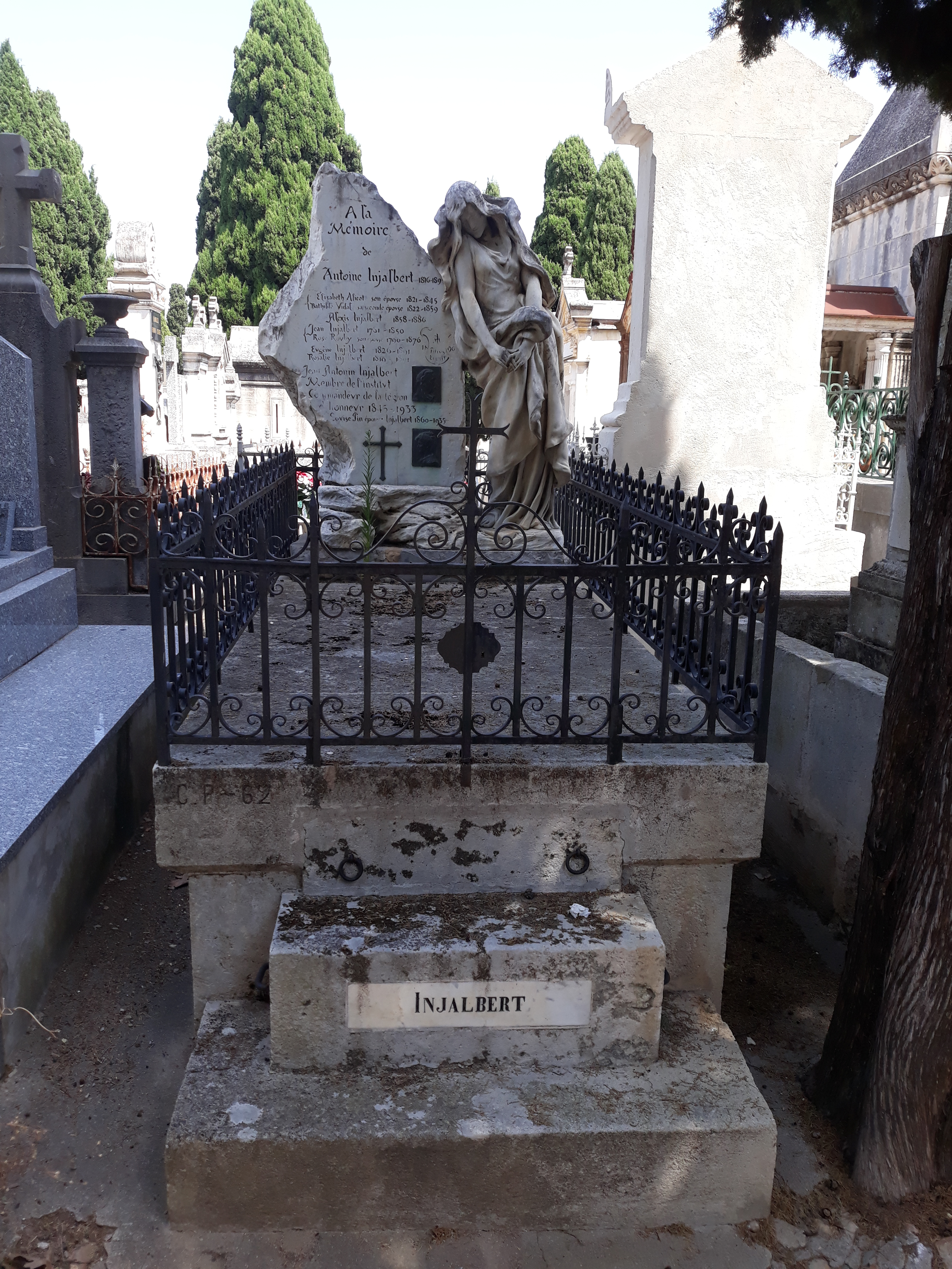 Das Grab des französischen Bildhauers Jean-Antoine Injalbert auf dem alten Friedhof von Béziers (Hérault).